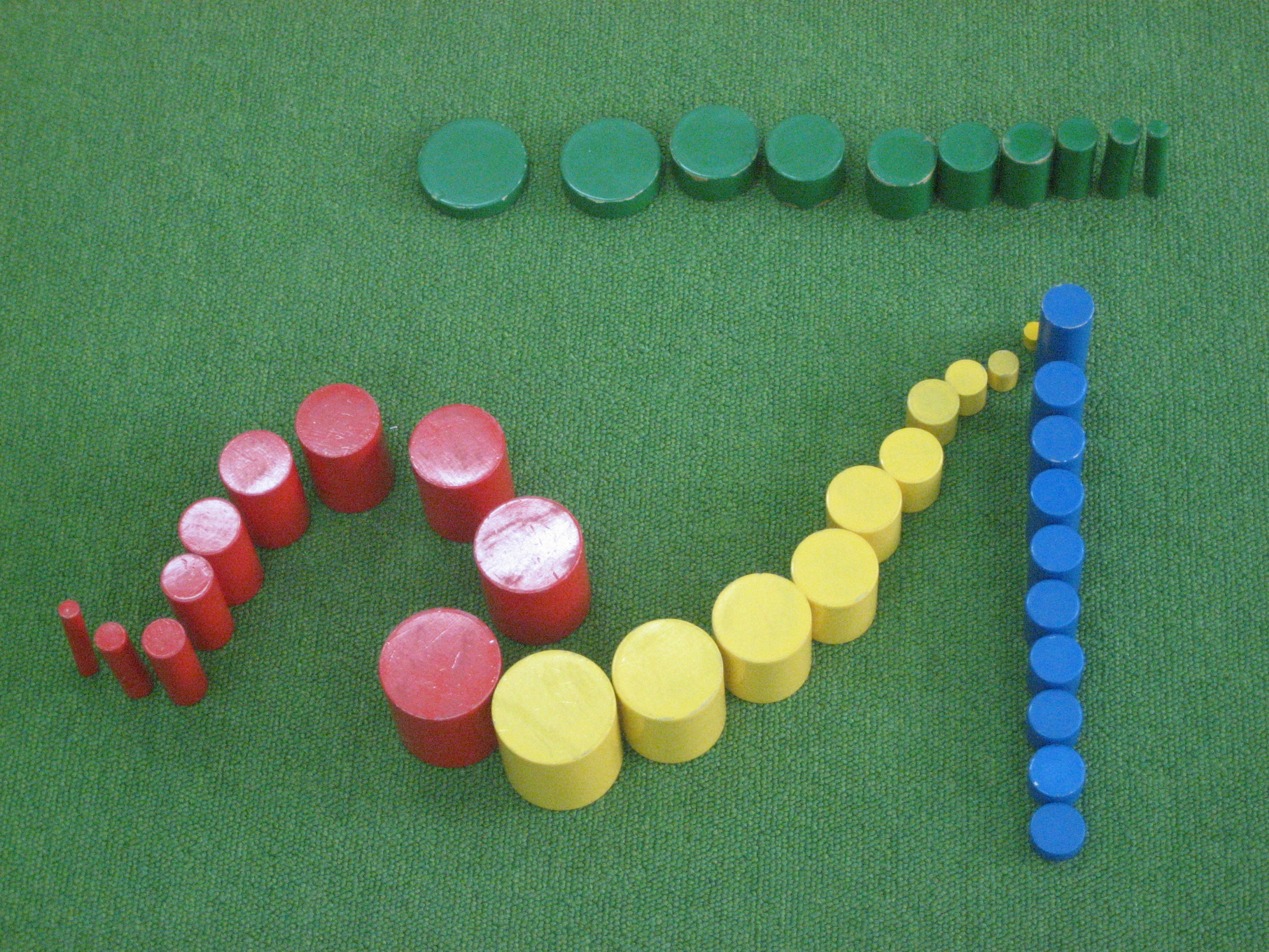 Koloritaj cilindroj, ilo uzata en montessoriaj lernejoj